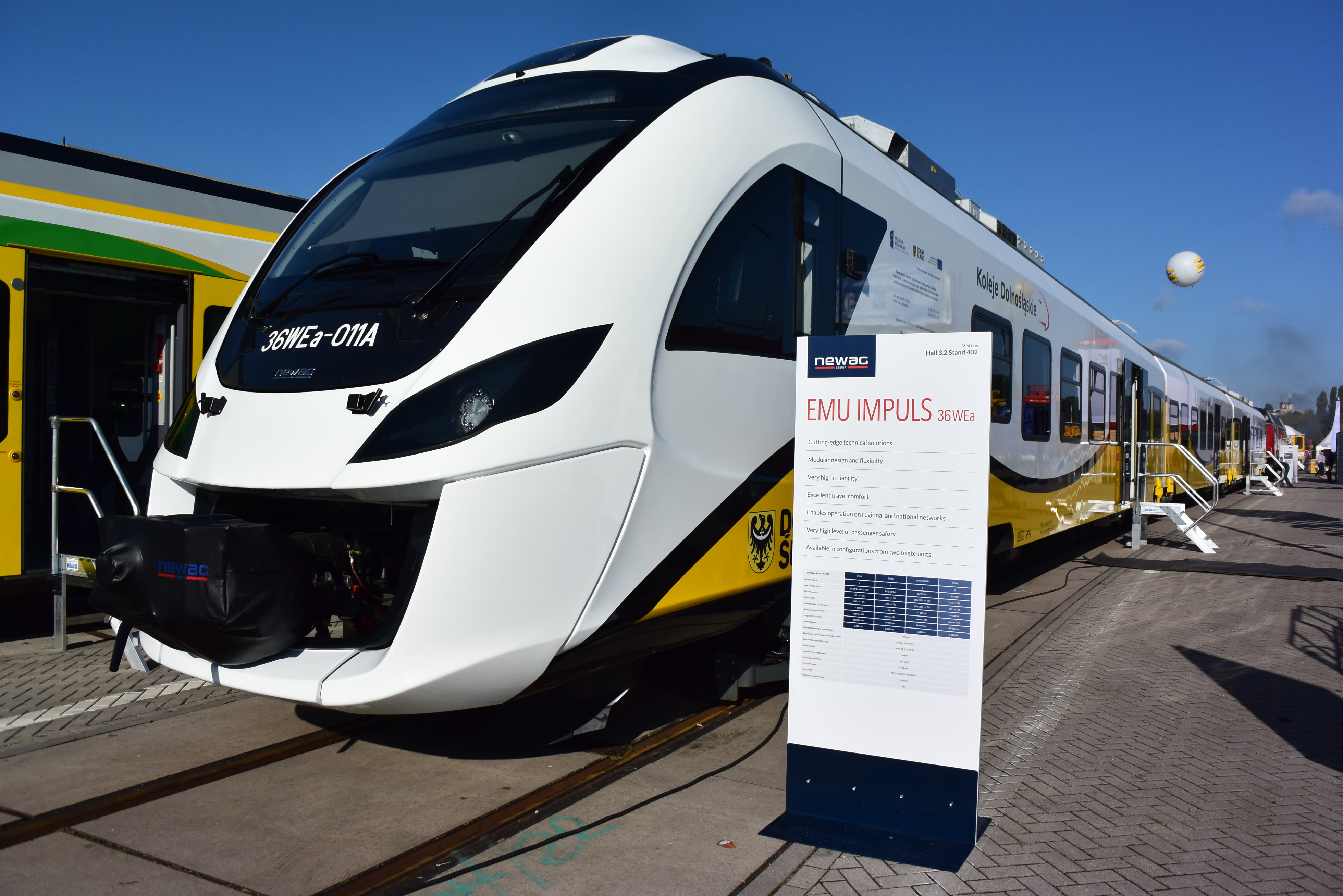 Newag Impuls podczas InnoTrans 2014